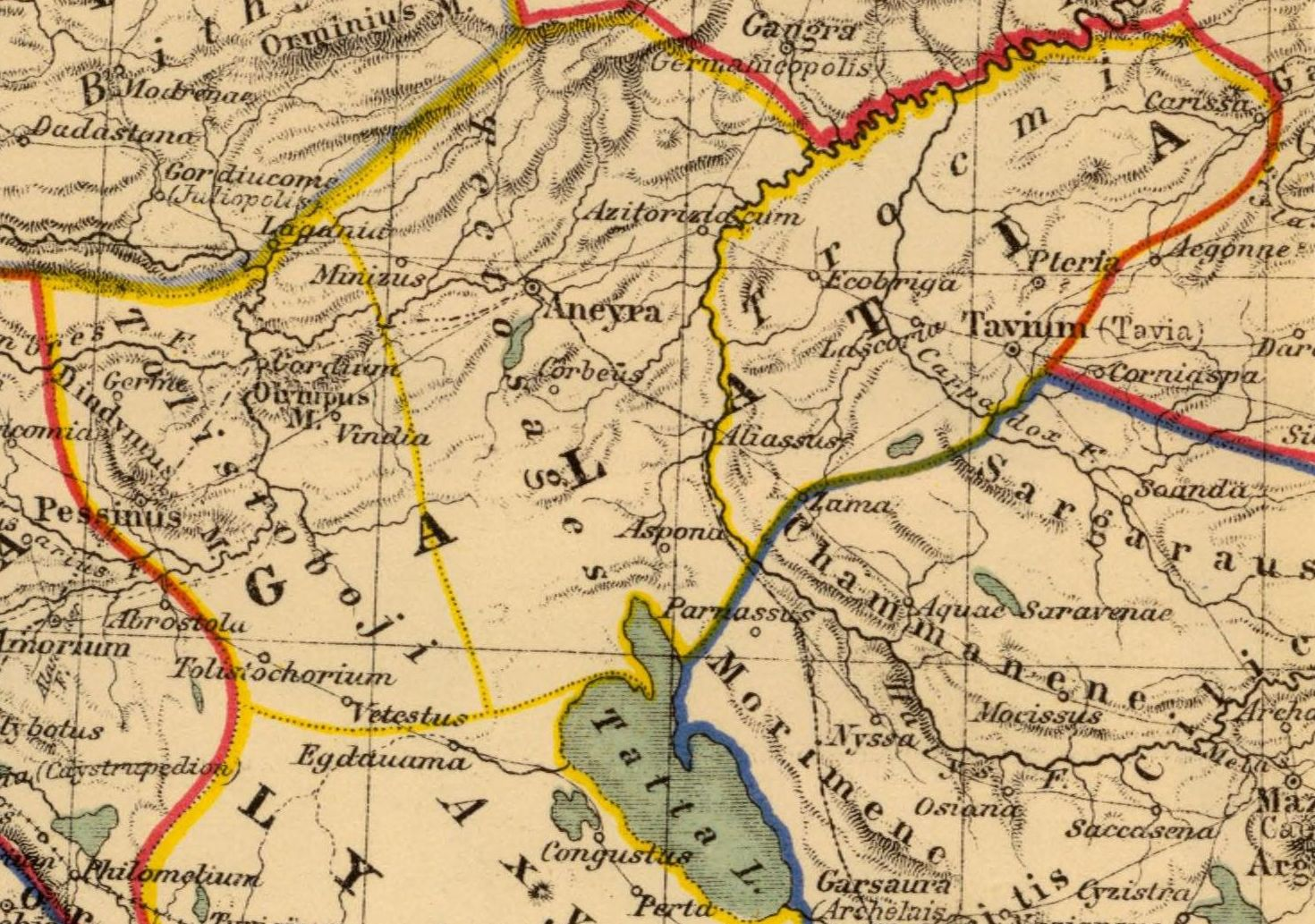 Galatia. Asia citerior. Auctore Henrico Kiepert Berolinensi. Geographische Verlagshandlung Dietrich Reimer (Ernst Vohsen) Berlin, Wilhemlstr. 29. (1903)